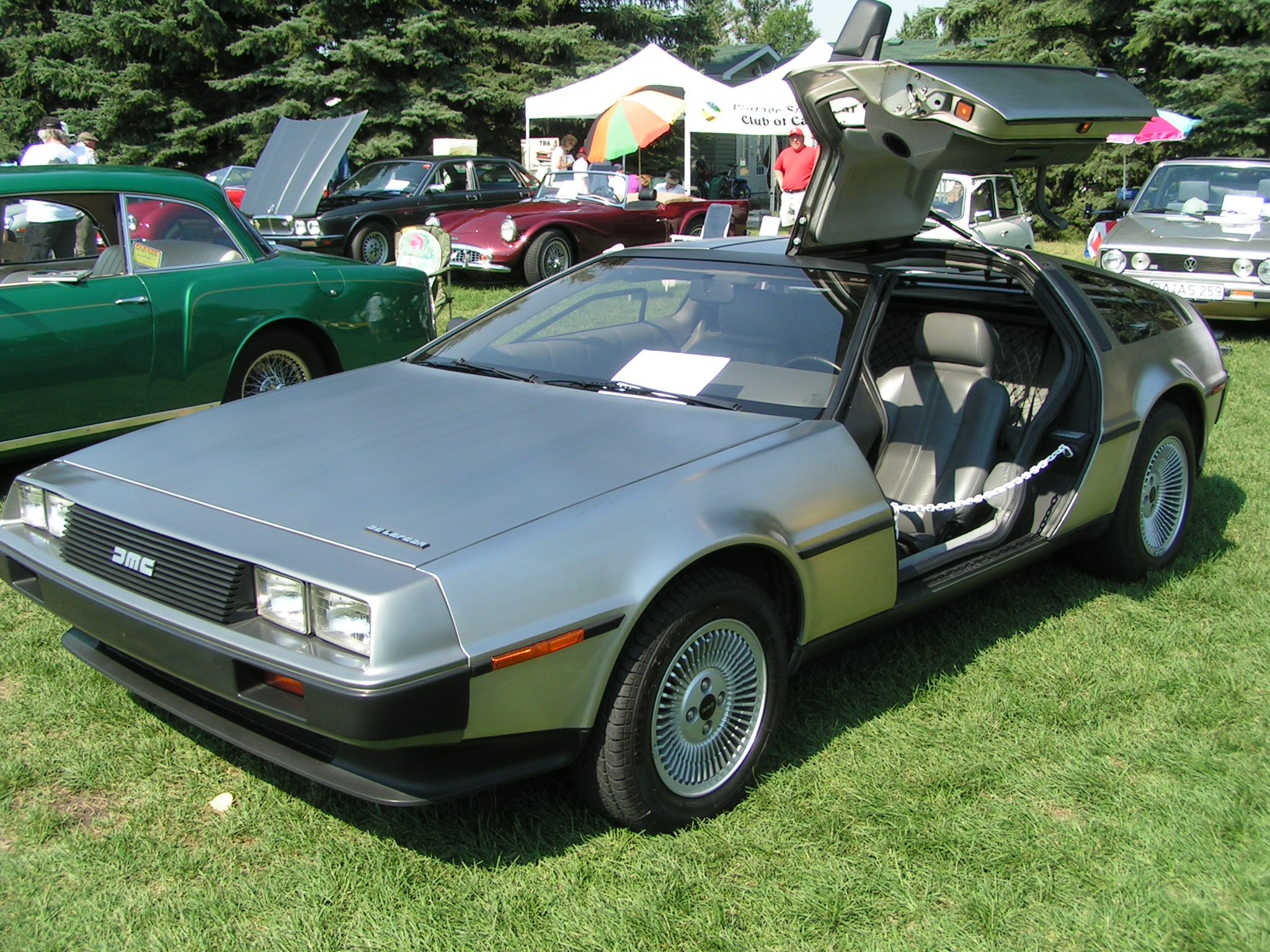 1983 Delorean DMC-12